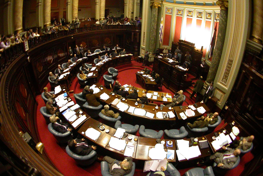 Senado, Parlamento uruguayo